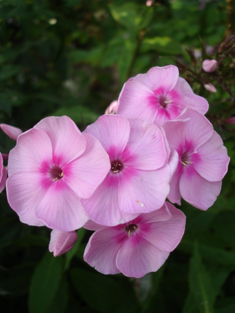 Phlox paniculata *Elizabeth Arden'